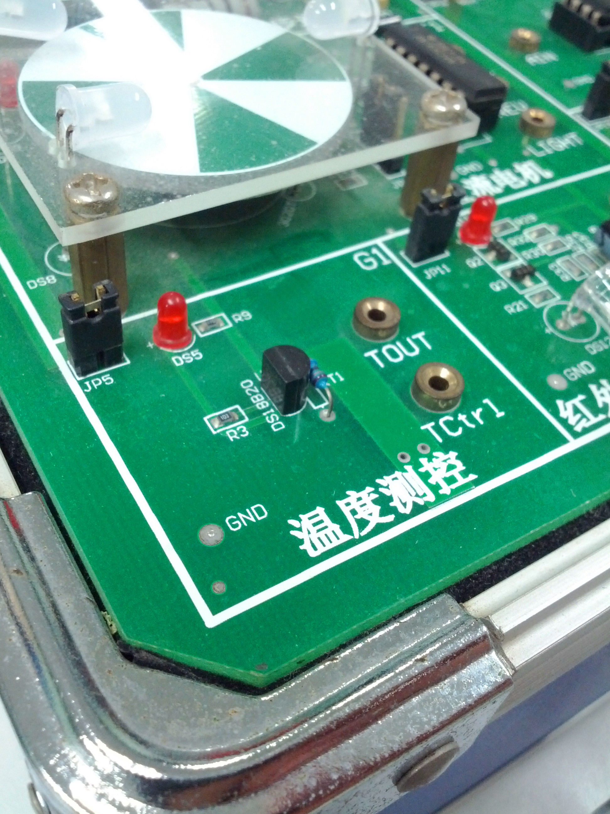 中文（中国大陆）: 为单片机实验准备的温度测控模块